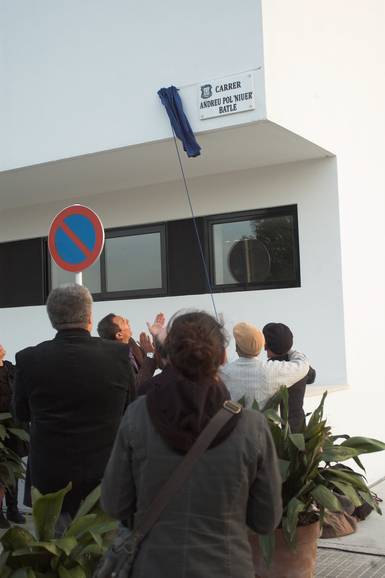 inauguració placa carrer Andreu Pol Lladó, Binissalem